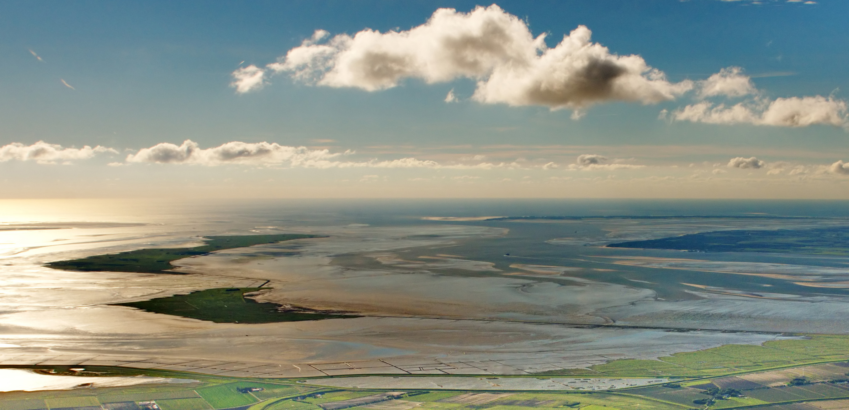 Fotoflug über das nordfriesische Wattenmeer - Langeneß, Oland und rechts hinten Amrum